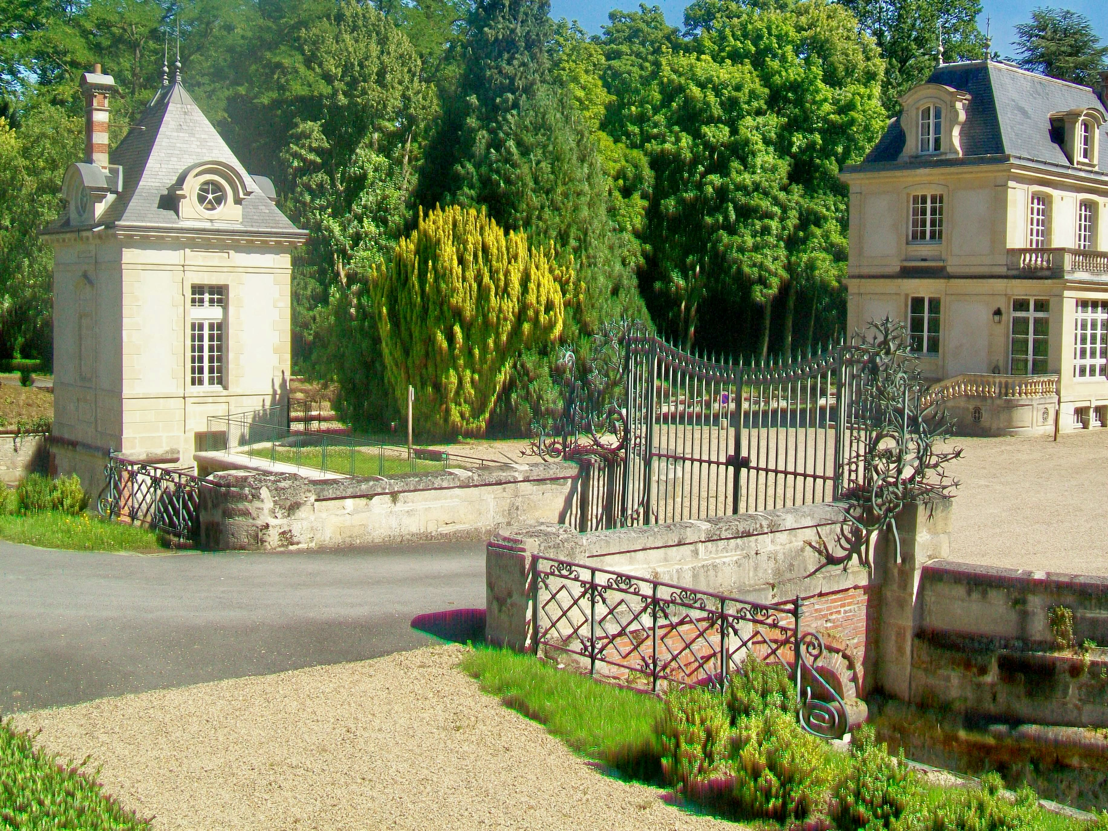 L'un des deux pavillons de garde identiques sur la rue, la grille du parc et le pont sur les douves.